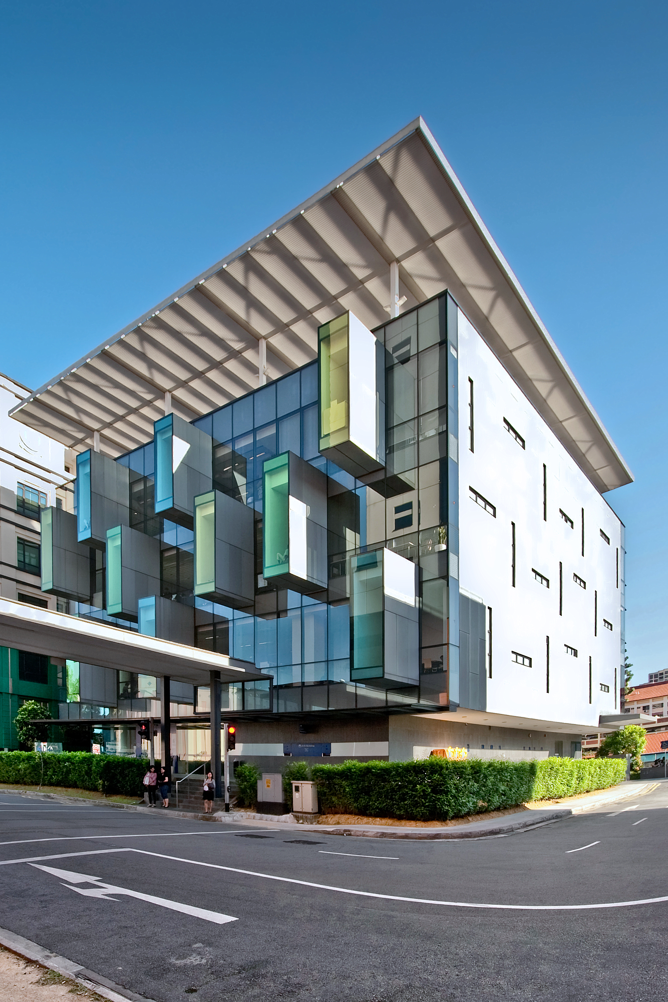 Bishan Library, Singapore